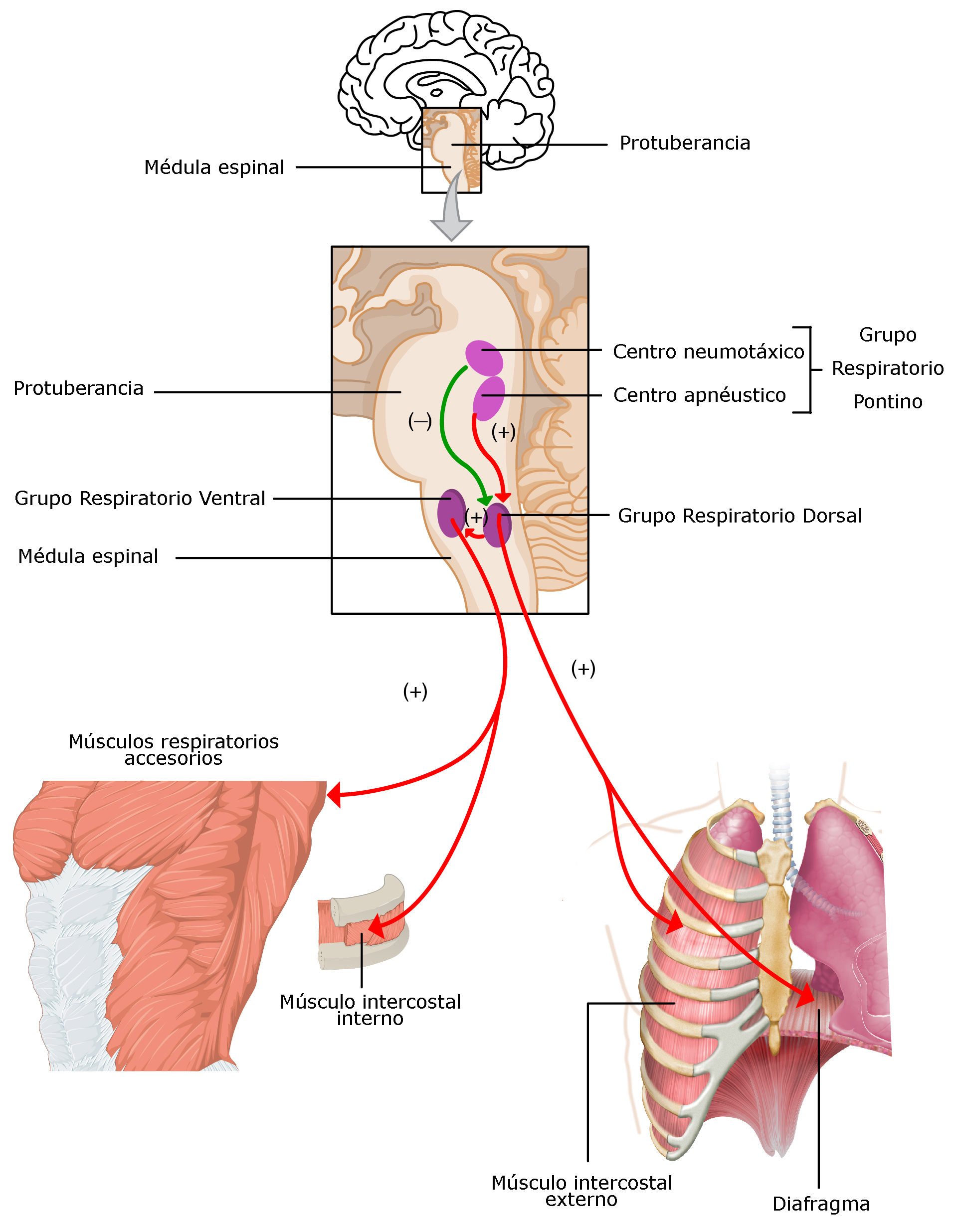 Esquema en el que se muestra la regulación de la respiración humana por el sistema nervioso.